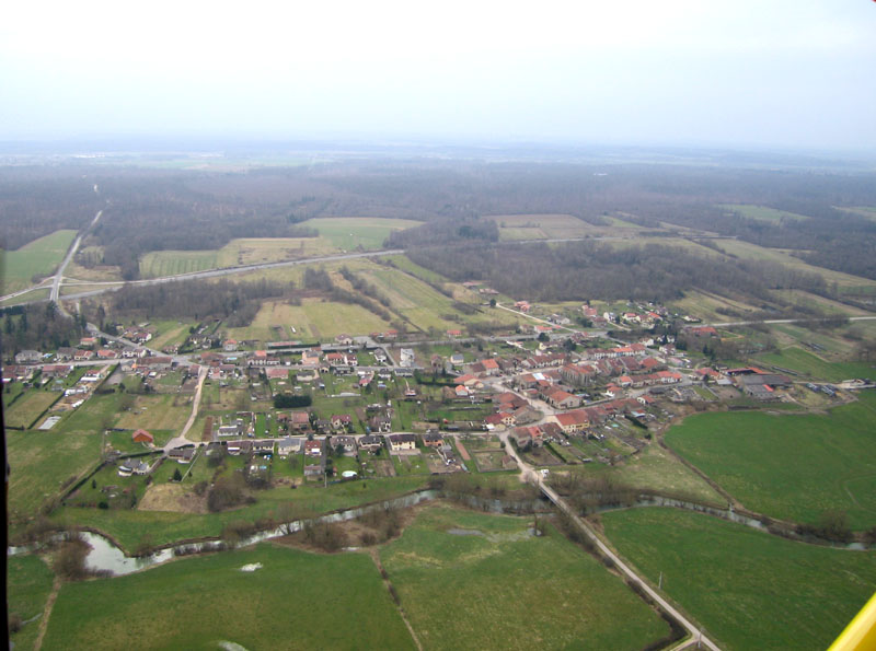 Thiébauménil vue aérienne, cliché personnel, mars 2005. 800 X 595 pixels Catégorie:Image de commune de Meurthe-et-Moselle